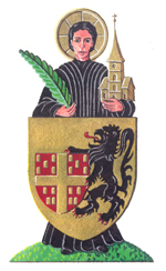 Wapen van de gemeente Houthalen-Helchteren